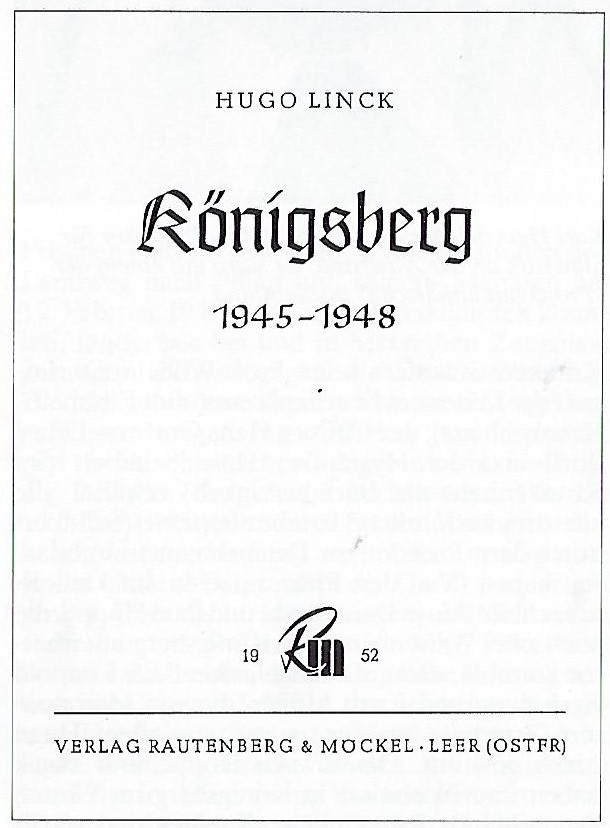 Umschlag des Königsberg-Buchs von Hugo Linck